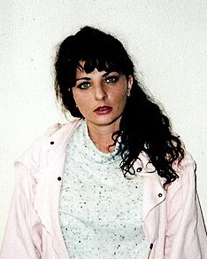 Odile Schmitt dans les studios de Frequence Paris Pluriel pour l'émission spécial "Princesse Sarah" de Frequence Cartoon.